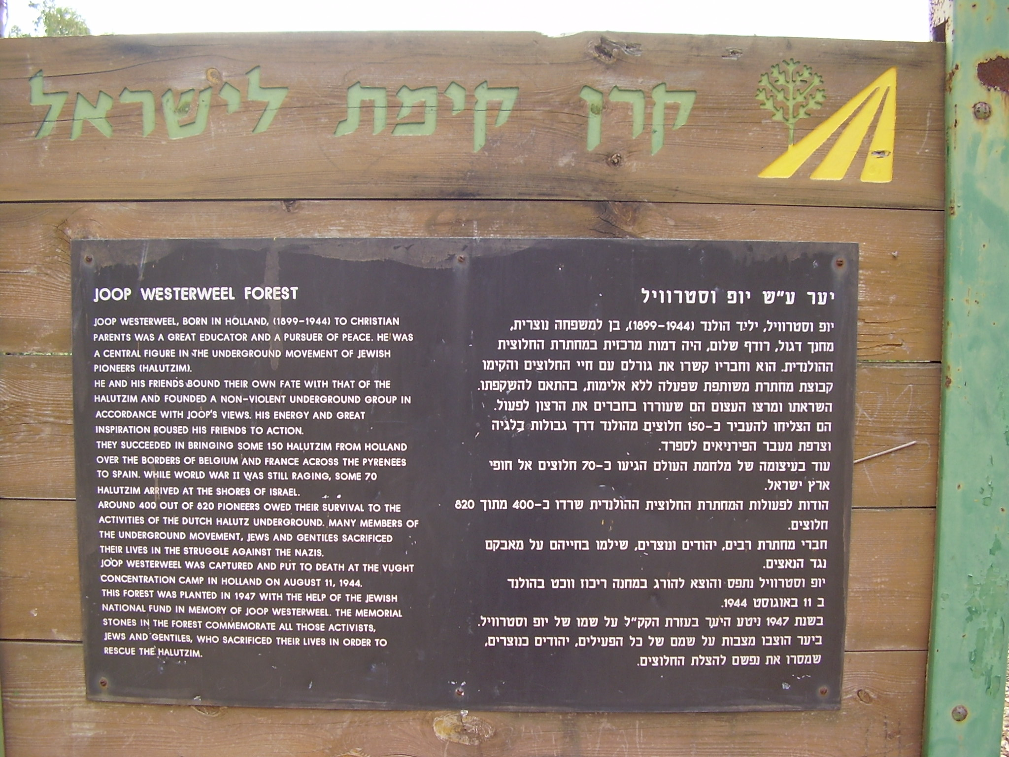 לוח הסבר של קק"ל ב"יער יופ וסטרויל" רישיון נוצר על ידי משתמש:Avi1111